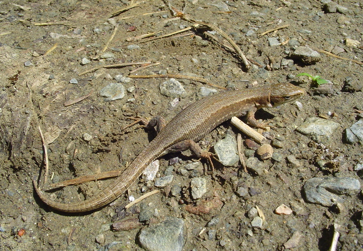 Darevskia praticola (formerly Lacerta praticola)